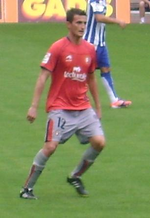 Joseba Llorente, futbolista español.